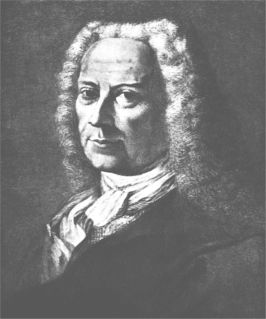 Ritratto di Francesco Scipione Maffei. Verona, Museo Maffeiano.